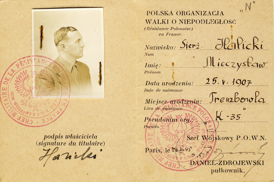 Legitymacja POWON Mieczysława Halickiego